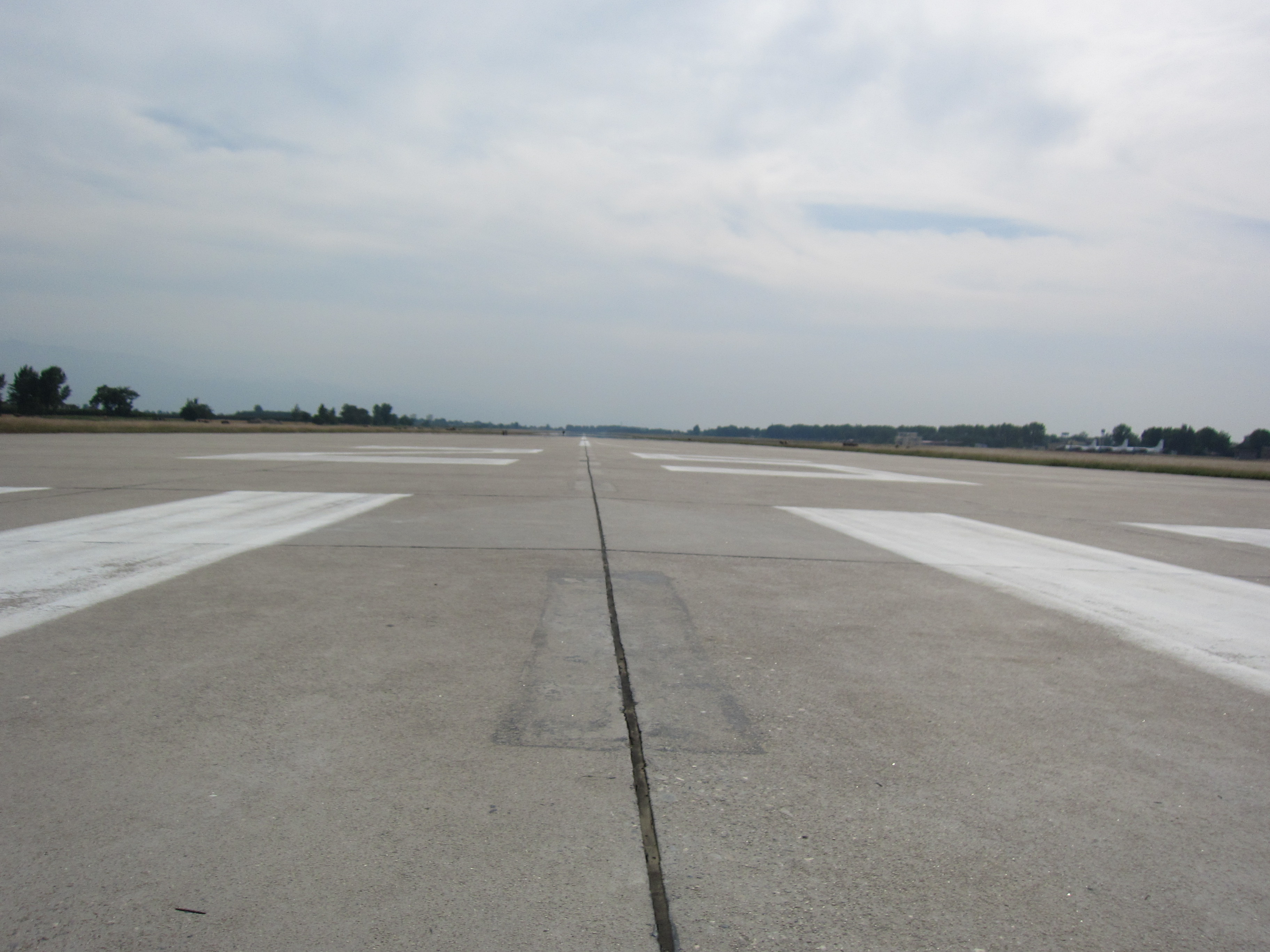 西安市鄠邑区甘亭镇户县机场